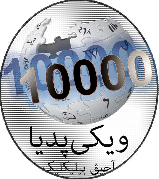 تۆرکجه: اون مینلبک لوگوسو